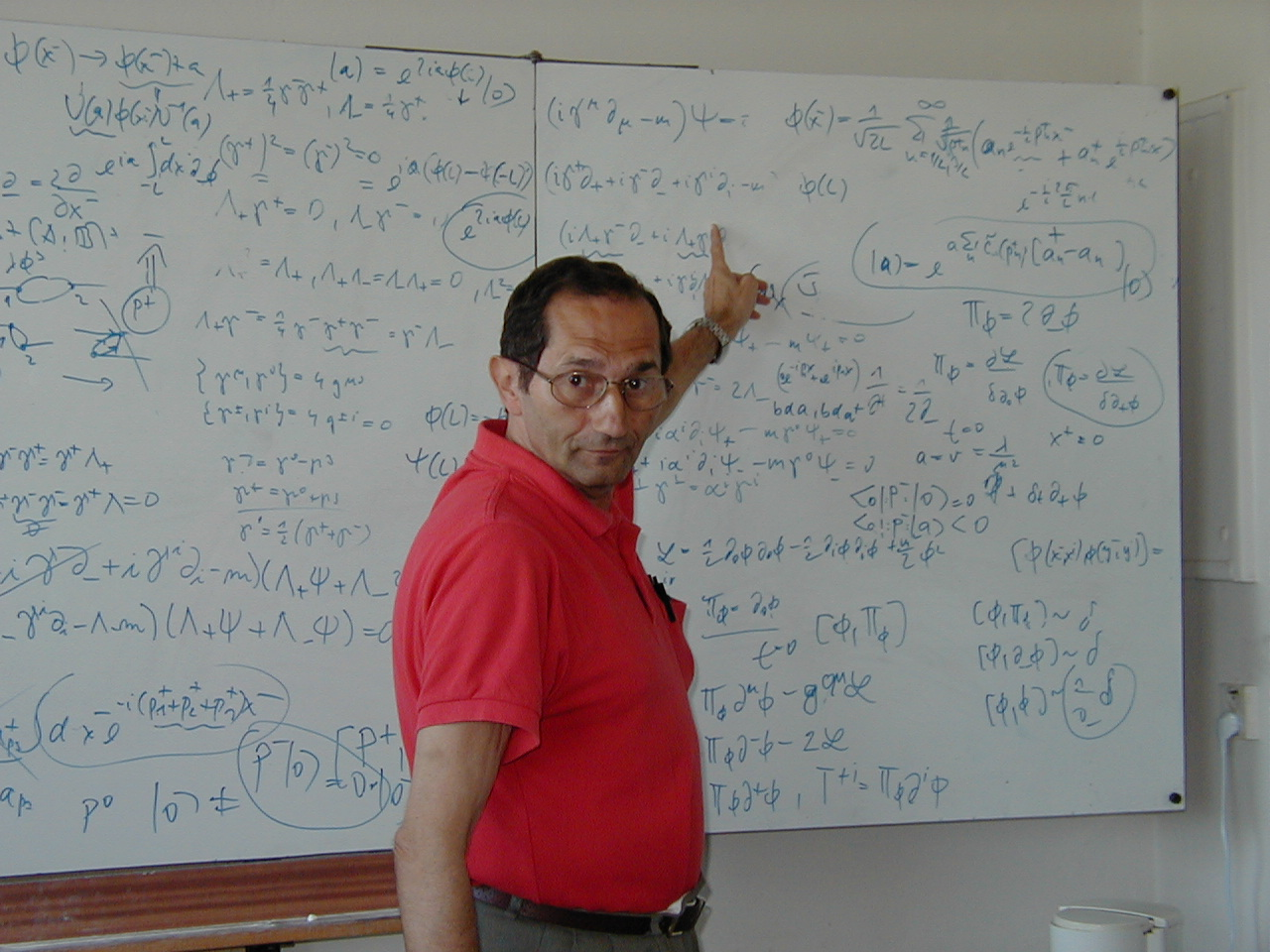 Dr. Kapišinský matematik